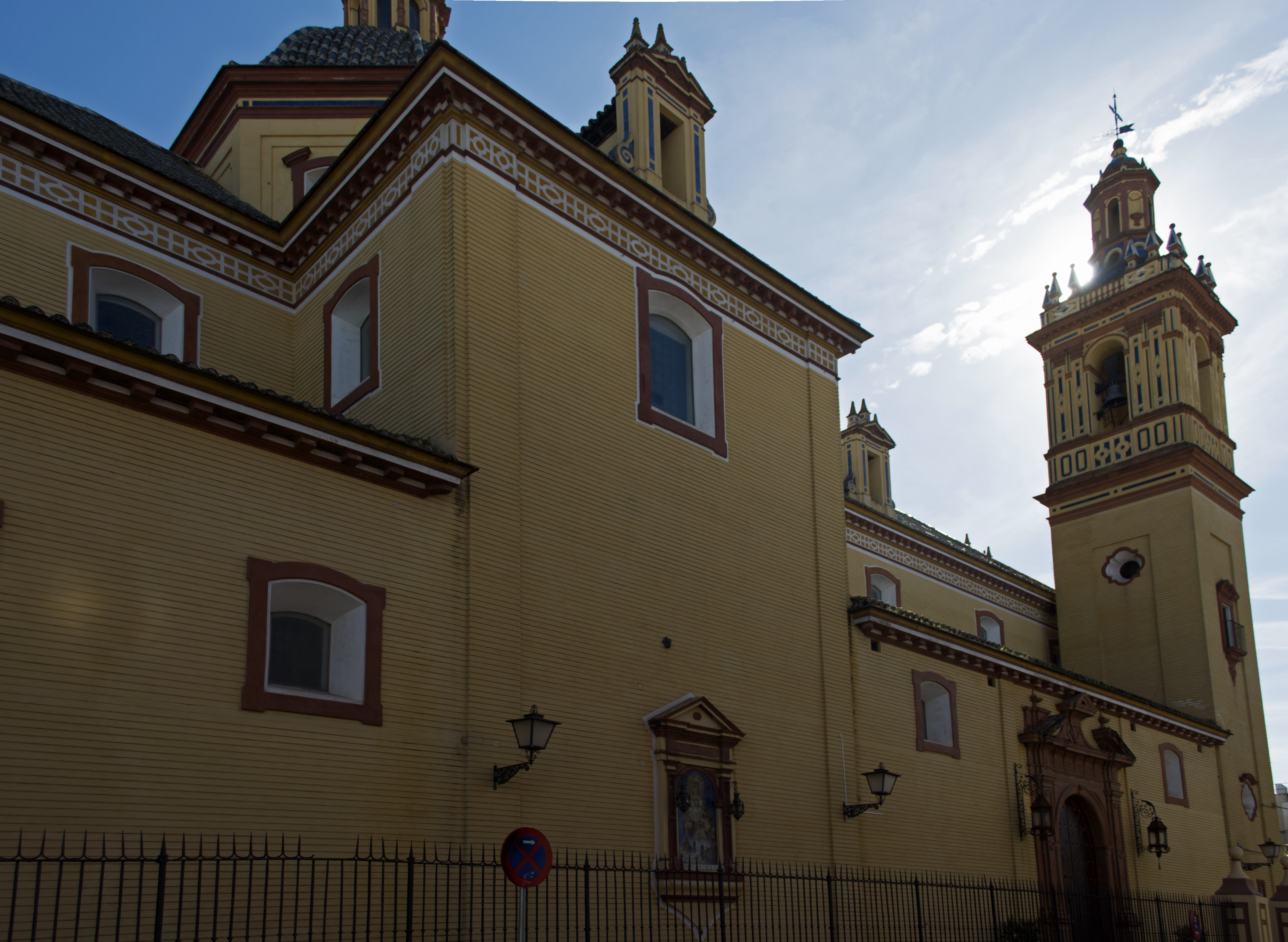 Iglesia de San Bernardo (Sevilla).